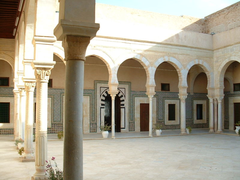 Photographie personnelle prise à Kairouan (Tunisie). Une des cours intérieures de la mosquée du barbier